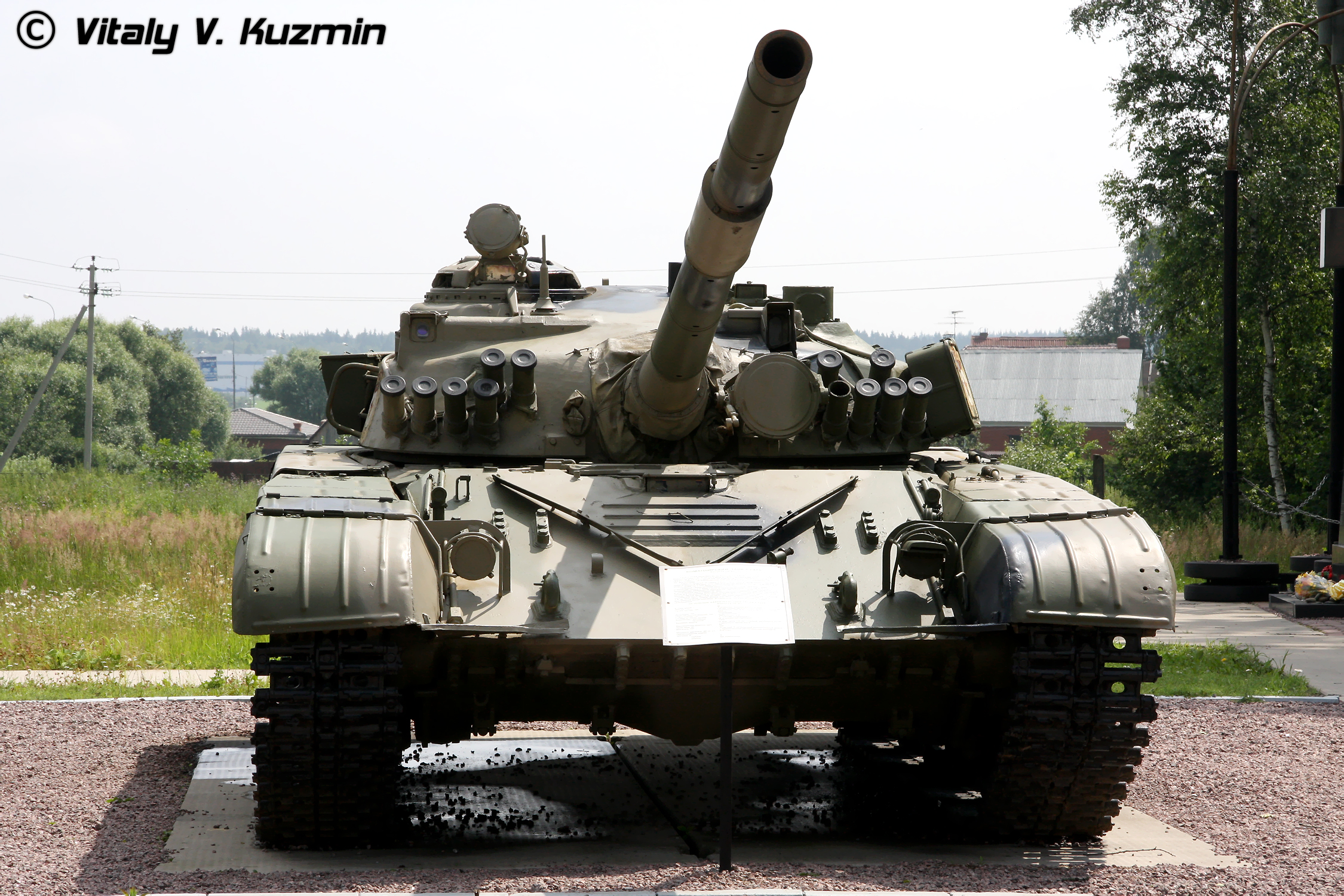 Т-64АК